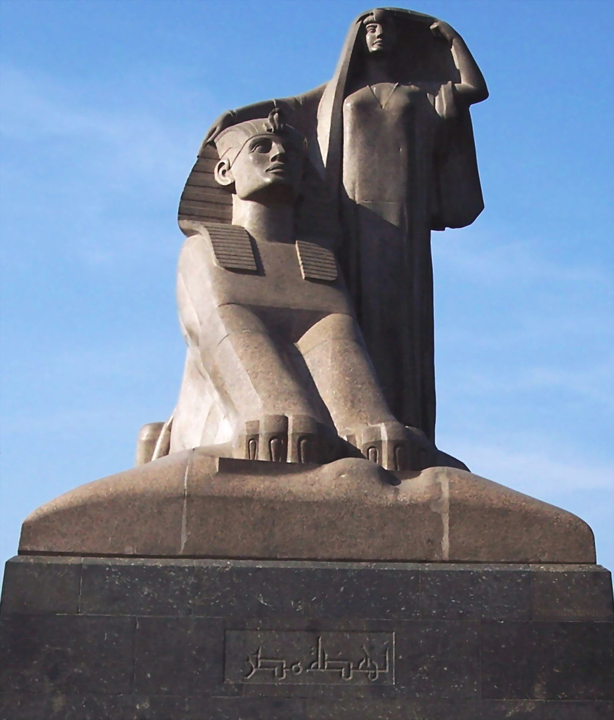 Nahdet masr